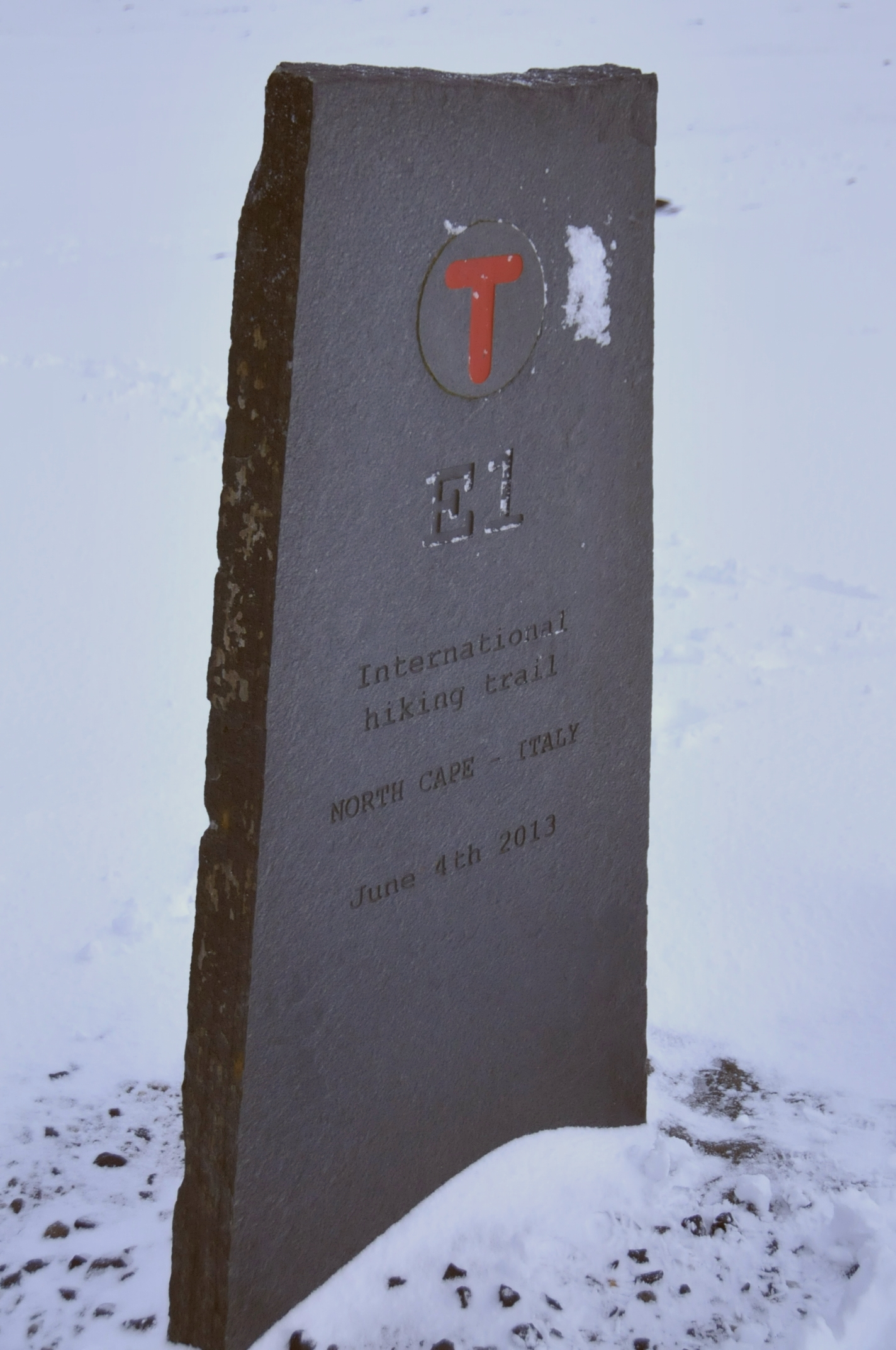 Startstein des Europ. Fern(rad)wanderwegs E1 am Nordkapp